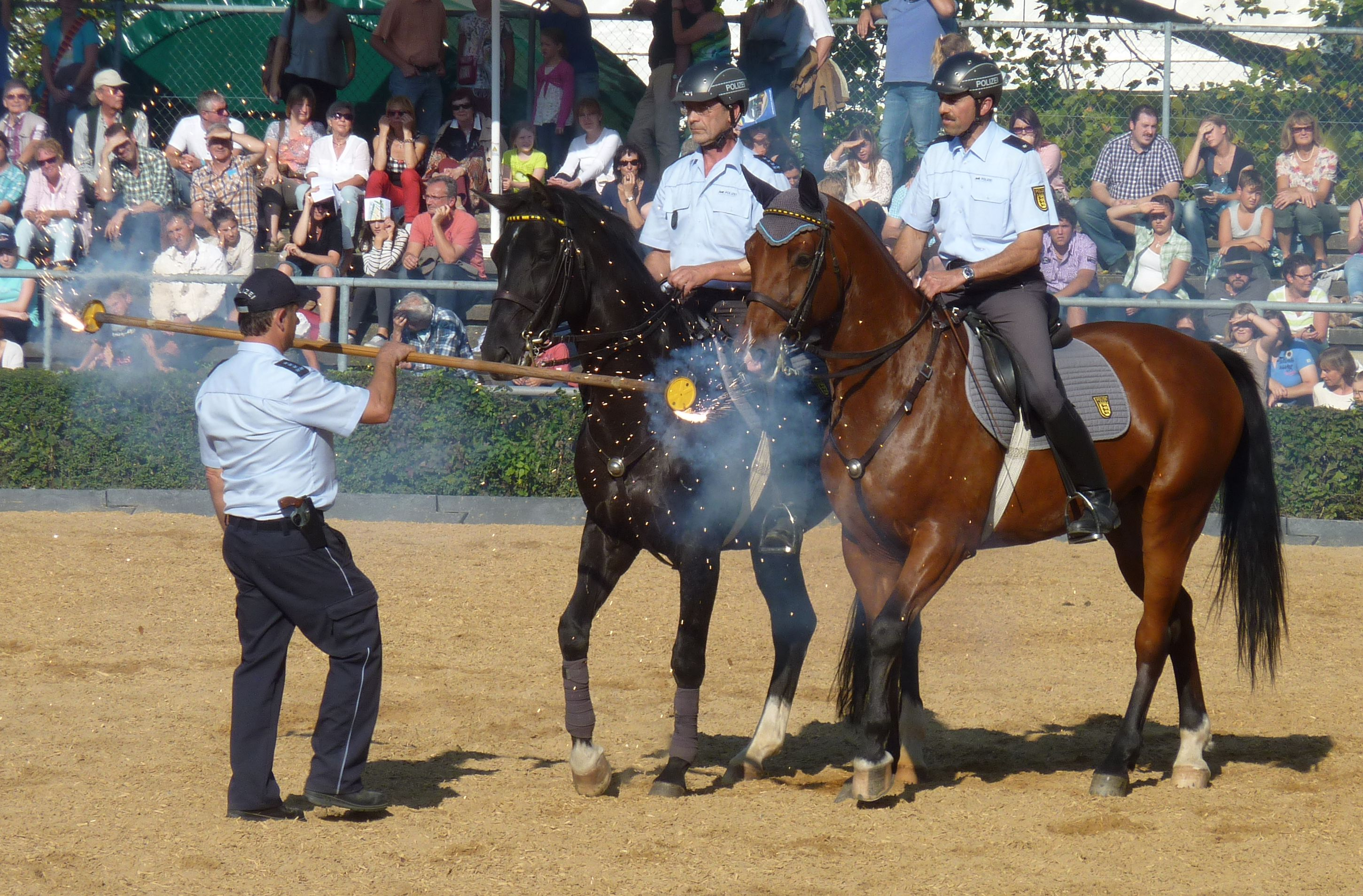 Vorführungen auf dem Landwirtschaftlichen Hauptfest 2014.